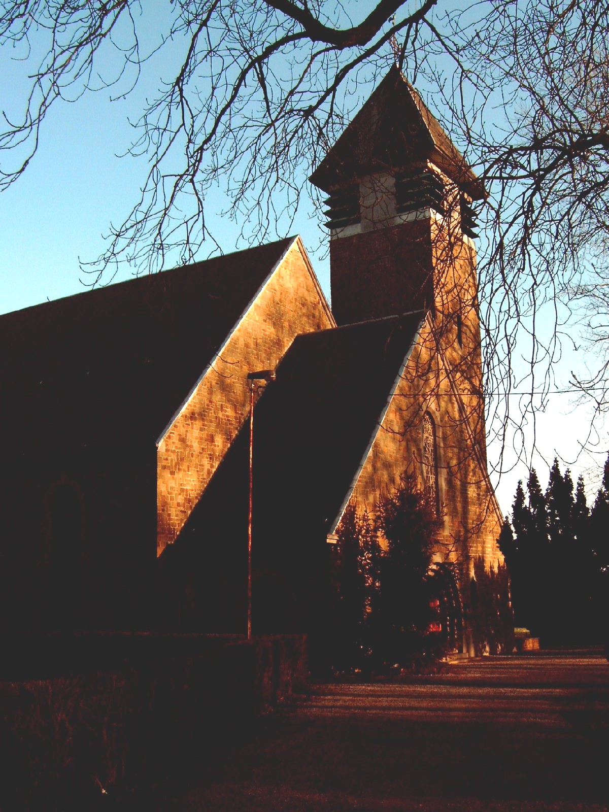 De kerk van Saint-Lambert in Boninne. Eigen opname.